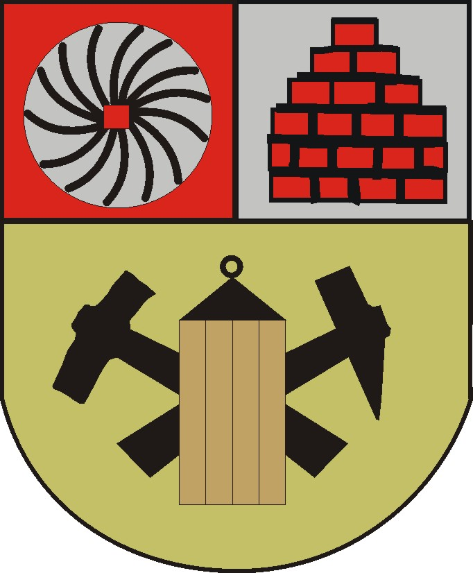 Wappen des Ortsteils Bölhorst der Stadt Minden. Heraldische Elemente: Oben vorne: ein silberner Mühlstein auf rotem Grund Oben hinten: Gestapelte rote Ziegelsteine auf silbernen Grund. Unten: Goldene Grubenlampe vor Bermanngezähe bestehend aus Schlägel und Eisen in Schattenfarbe auf goldenem Grund.